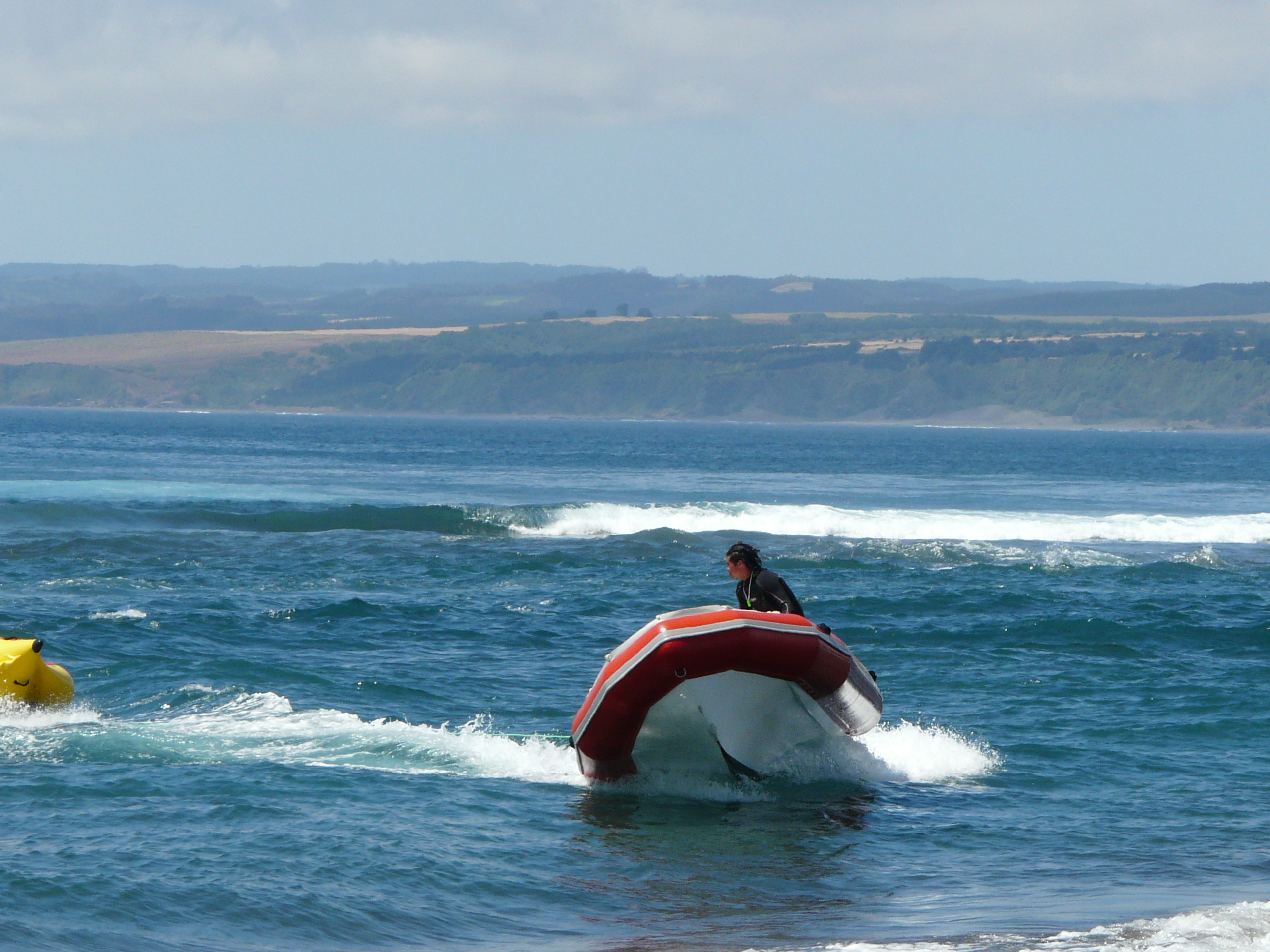 Pichilemu_DIC_08 172